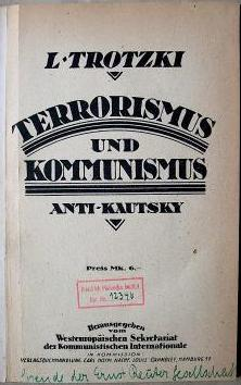 Titelseite L. Trotzki: Terrorismus und Kommunismus. Anti-Kautsky. Herausgegeben vom Westeuropäischen Sekretariat der Kommunistischen Internationale. In Kommission Verlagsbuchhandlung Carl Hoym Nachf. Louis Cahnbley. Hamburg 1920.